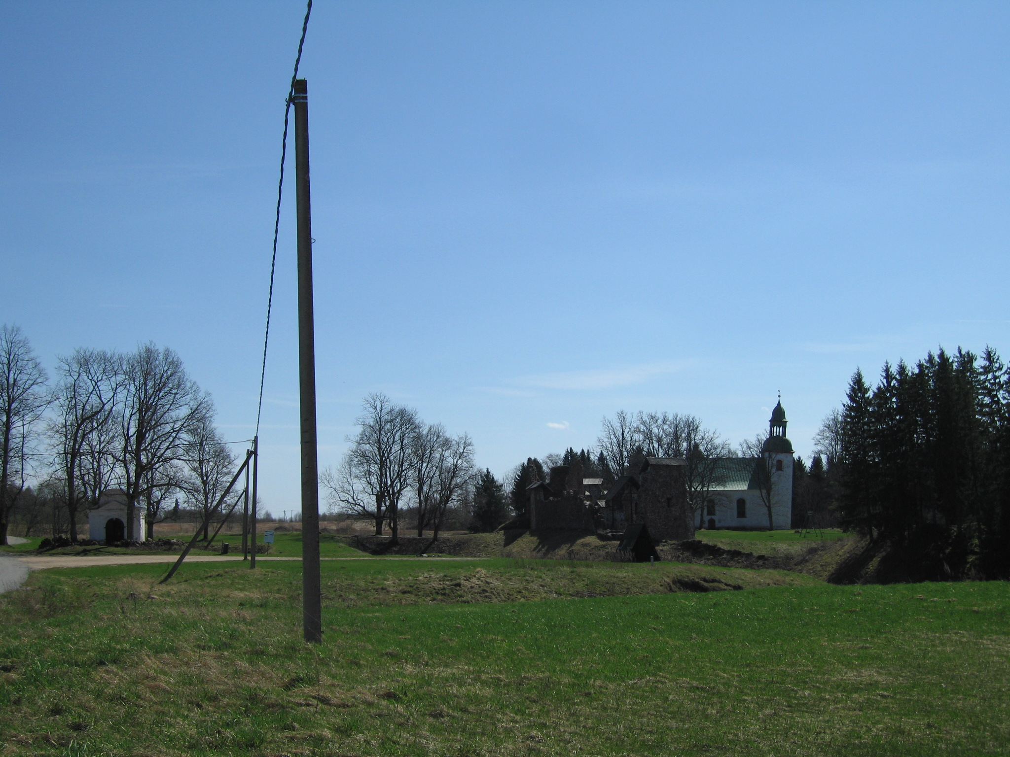 Vasemal on Karksi mõisa kalmistu ja selle matusekabel, paremal on Karksi linnuse kirdekülg ja Karksi luteri kirik.